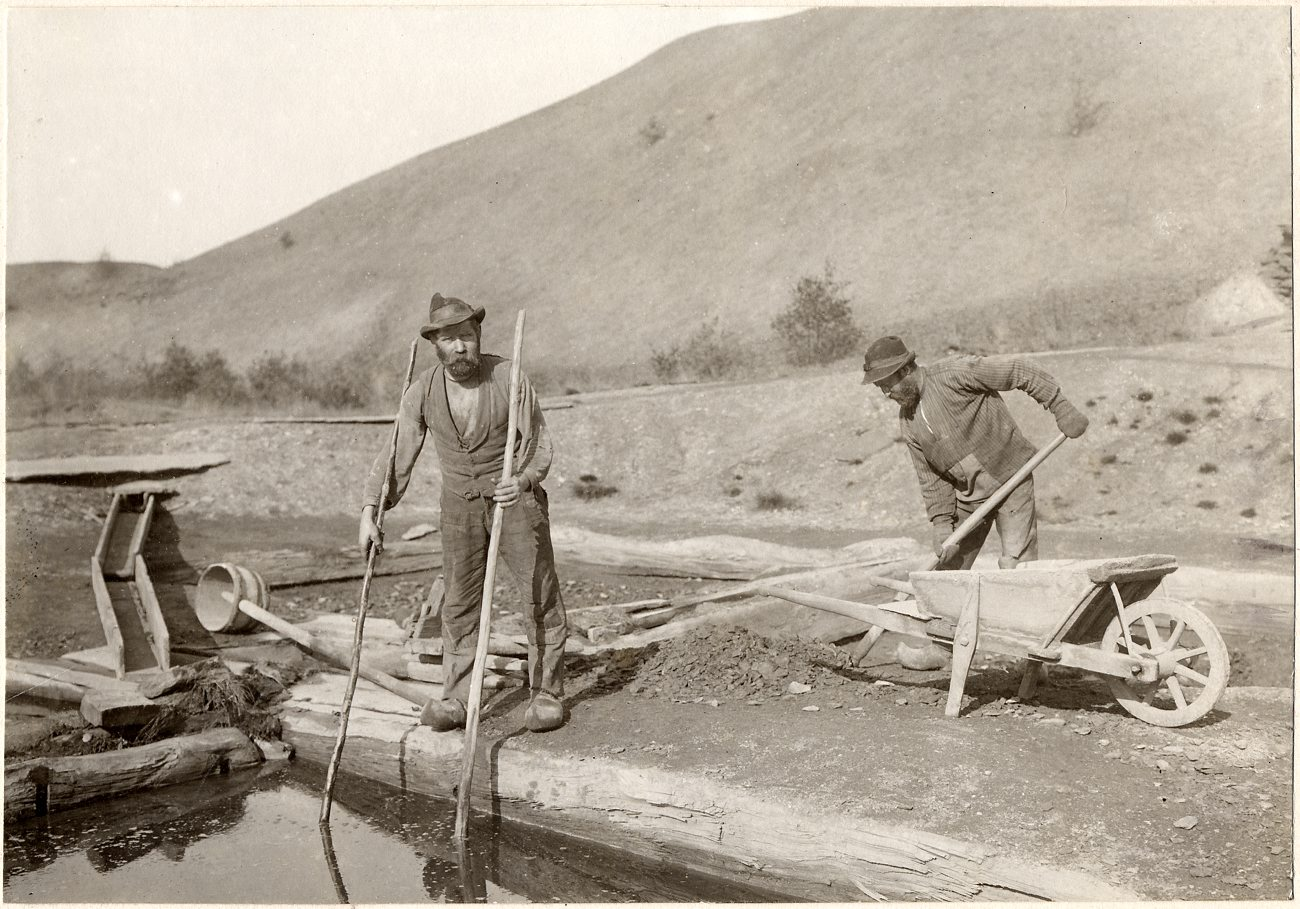 B9833. Andrarums Alunbruk. Karställe. Från de sista arbetena vid bruket. Fotografiet är skänkt till Tekniska museet från Svenska Turistföreningen.